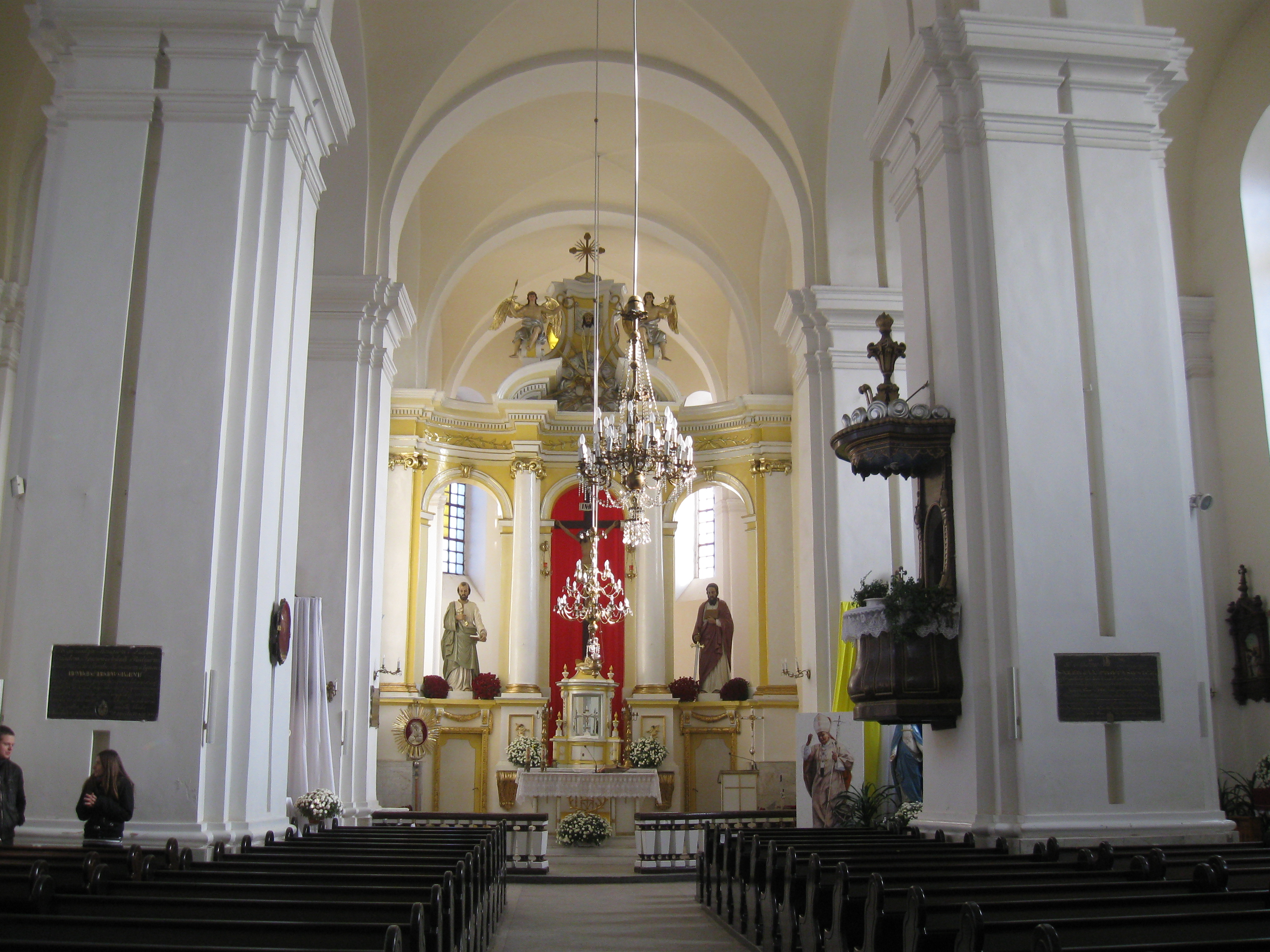 Беларуская (тарашкевіца): Ансамбаль былога кляштару бэрнардынцаў:Петрапаўлаўскі касьцёл, галоўны алтар касьцёлу, былы жылы корпус, агароджа. г. Іўе This is a photo of Belarusian heritage monument. Reference number: 412Г000286 ( WLM)